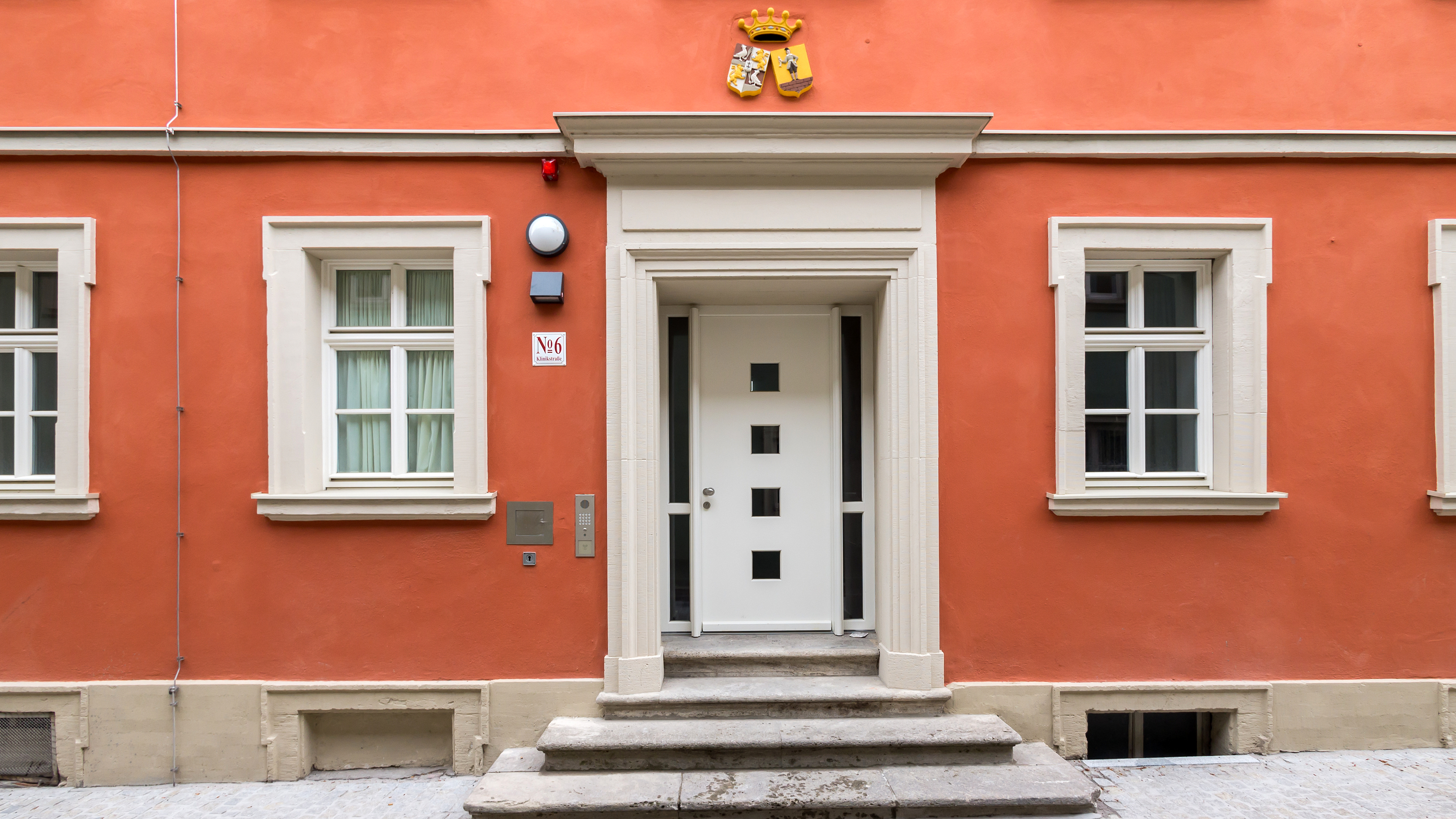 Würzburg Klinikstraße 6 Wohnhaus, ehemaliges Mathematisches Institut der Universität ,Wappenstein über Portal , Barock, spätes 18. Jahrhundert, Wiederaufbau 1953-54 I Akt.Nr.D-6-63-000-272